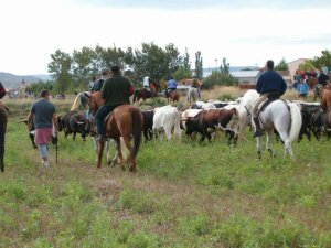 Encierro Andando, Novallas Esta fotografía ha sido realizada por jesbaq. Aparece también en otras páginas web como Fotos de Novallas mantenidas por jesbaq.